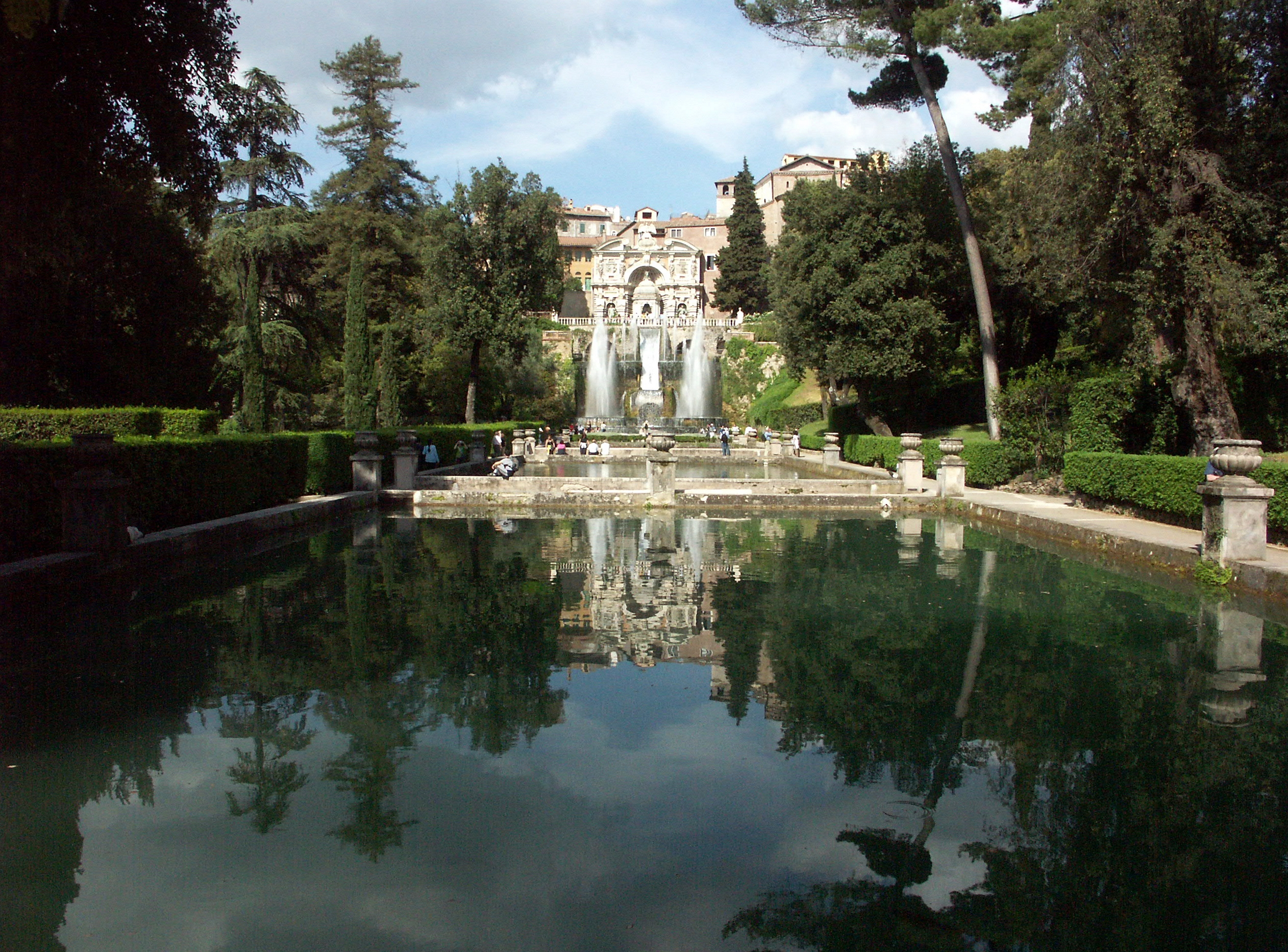 Tivoli, Villa d'Este, Querachse mit Neptunbrunnen und Wasserorgel